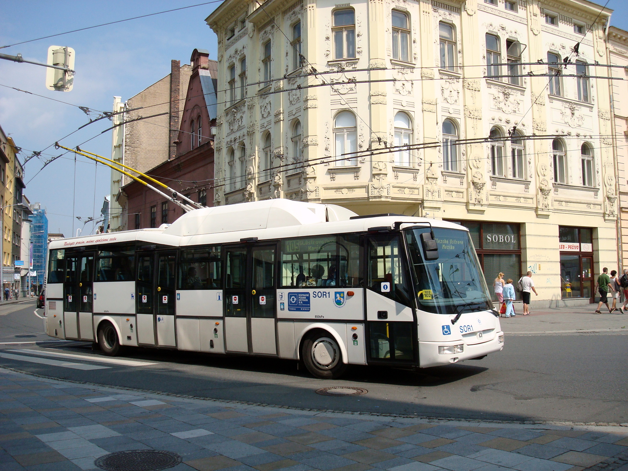 Trolejbus SOR TN 12 A v Ostravě